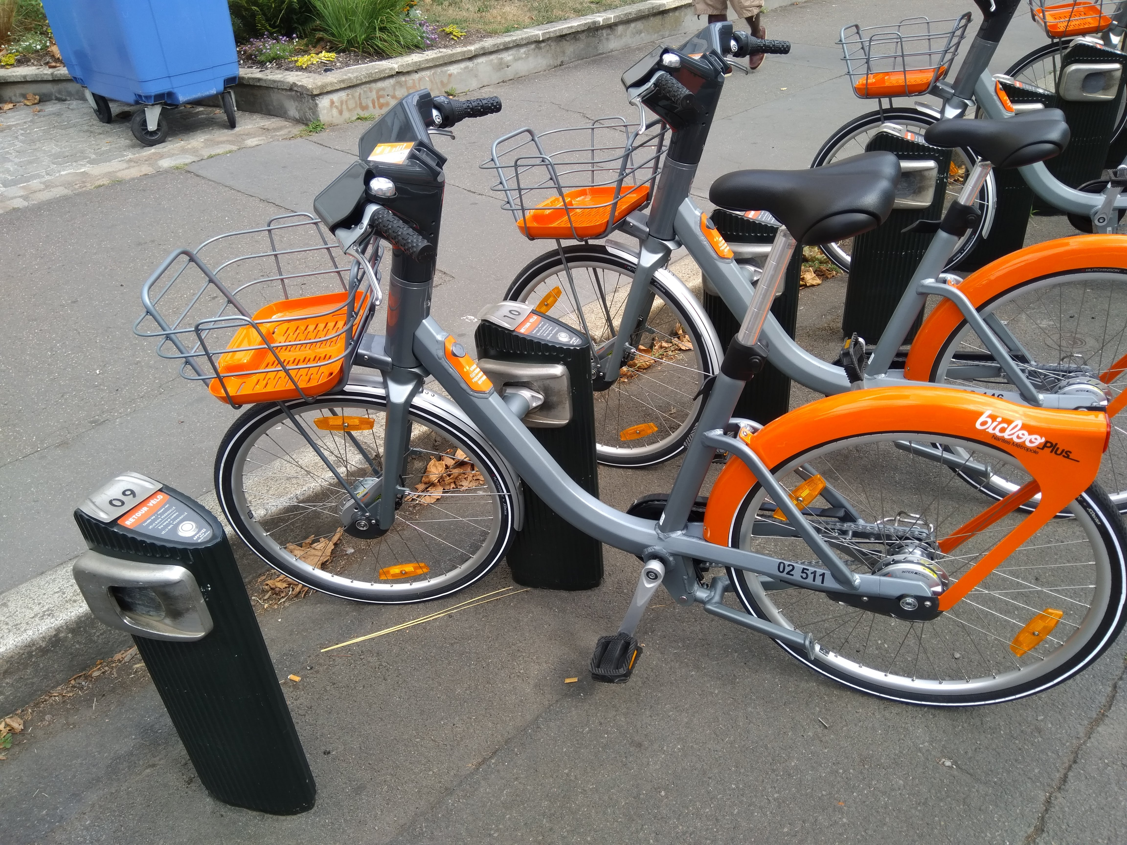 Vélo en libre service BiclooPlus (nouveau service Bicloo depuis le 21 août 2018) par JCDecaux à la station Manufacture à Nantes